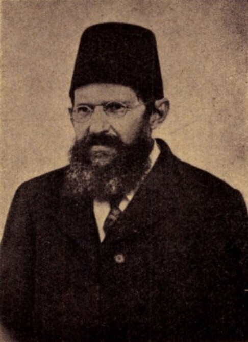 ישראל דב פרומקין. נסרק מחוברת "הגלגל" שיצאה לאור ב-11 במאי 1944. לאחר חלוף 50 שנה אין ז"י על התמונה